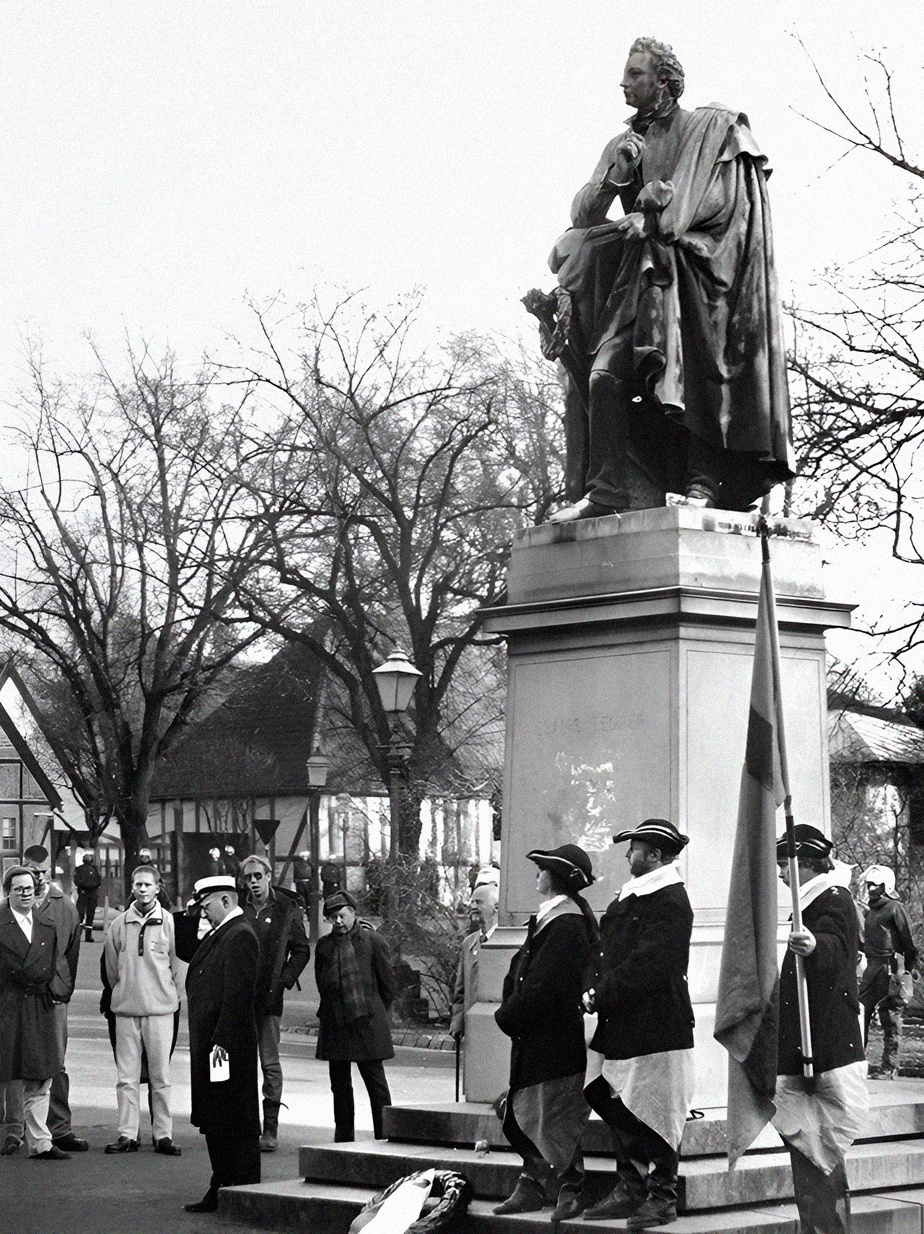 Den 30 november 1994 blev en mot tidigare år lugn dag i Lund. Lars Hultén (I studentmössa) höll sitt sedvanliga tal för ett tjugotal av 30 Novemberföreningens medlemmar som vid middagstid samlats vid Tegnér statyn i Lundagård, under bevakning av ett trettiotal poliser.